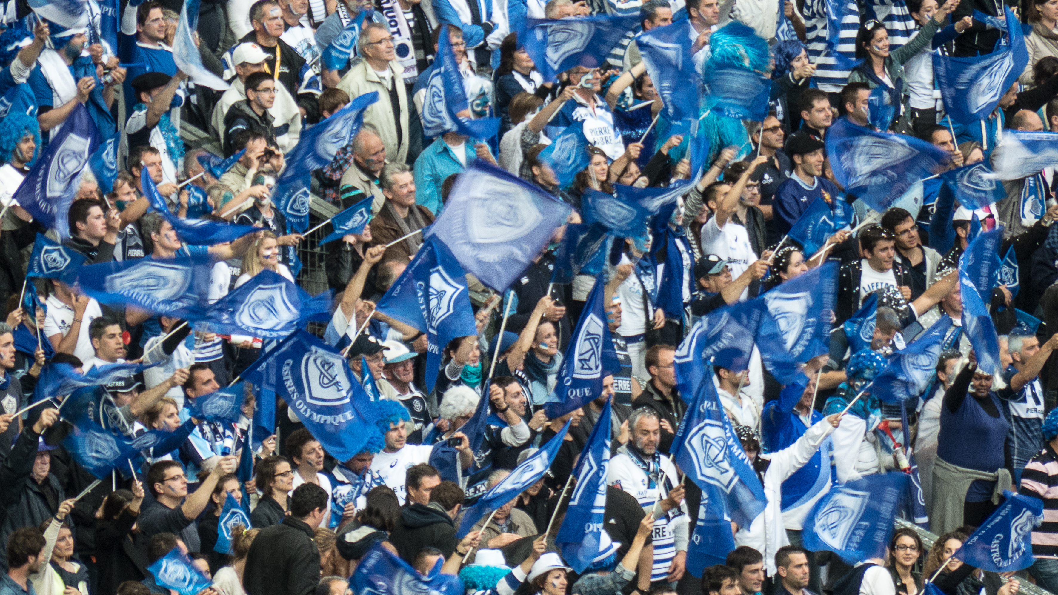 Finale du TOP 14 - Castres vs Toulon (19-14) - Stade de France - 1er juin 2013 Finale du TOP 14 - Castres vs Toulon (19-14) - Stade de France - 1er juin 2013.